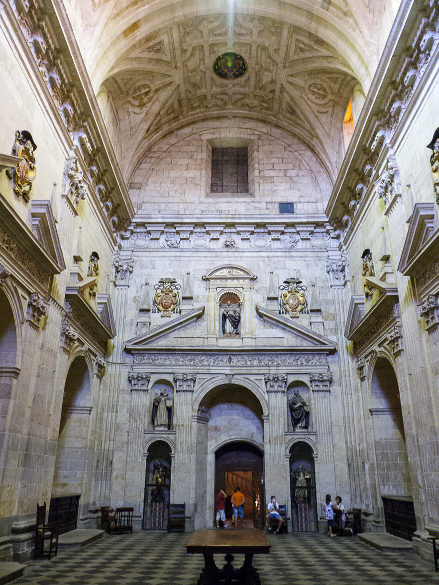 04082013 132528 SALAMANCA 1004